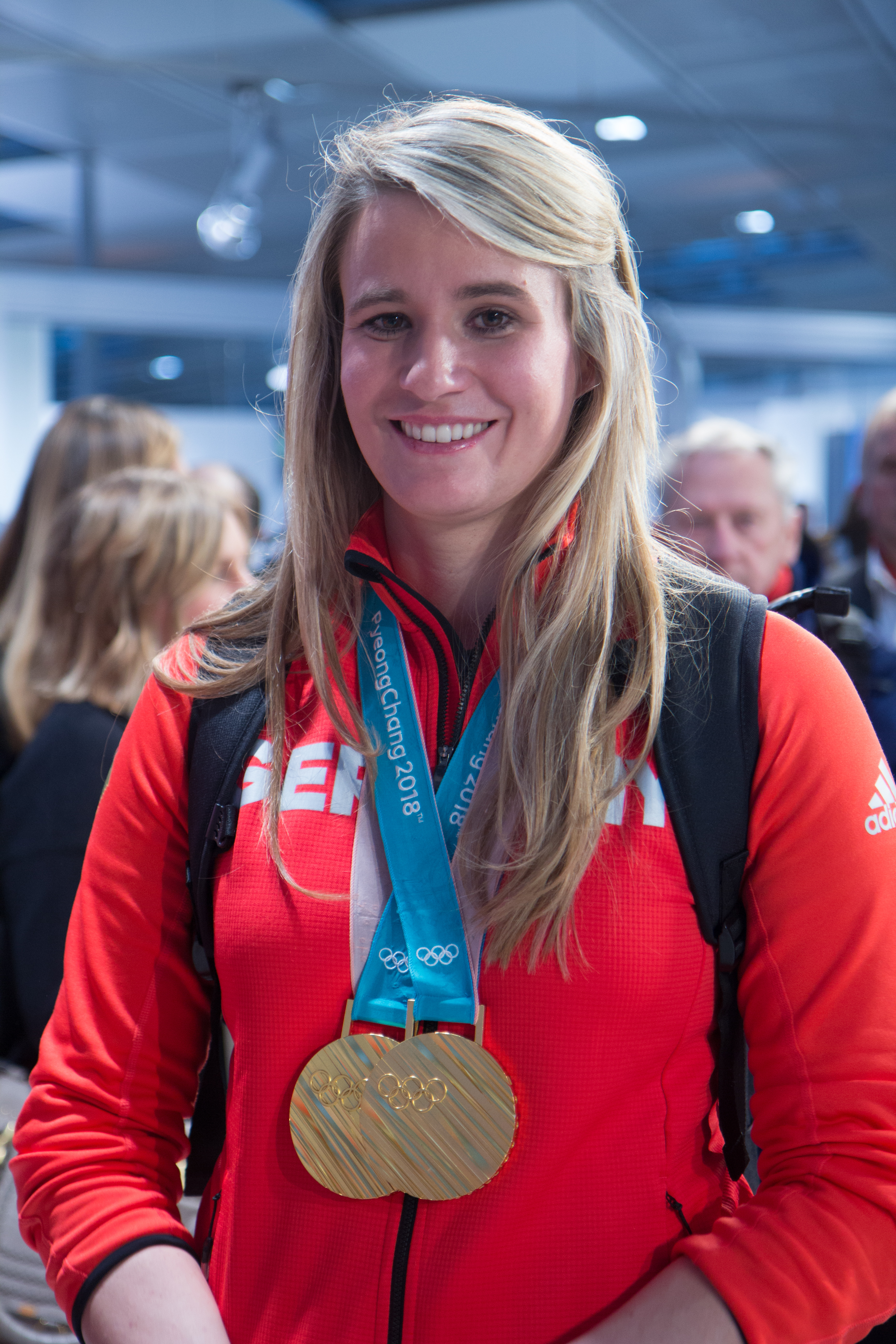 Ankunft der deutschen Olympiamannschaft am 26. Februar 2018 mit Flug LH713 auf dem Frankfurter Flughafen.